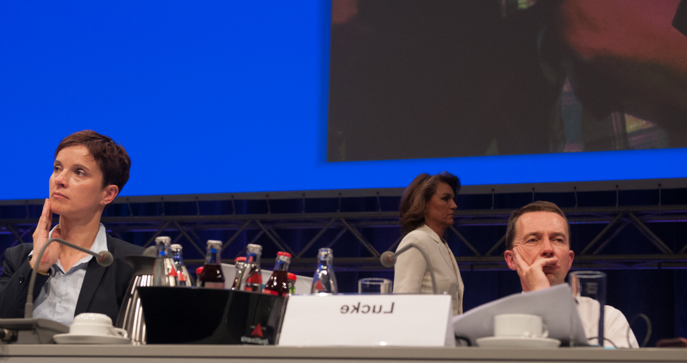 a.o. Bundesparteitag der Alternative für Deutschland, 4. Juli 2015 in Essen, Gruga Halle a.o. Bundesparteitag der Alternative für Deutschland am 4./5. Juli 2015 in Essen, Gruga Halle